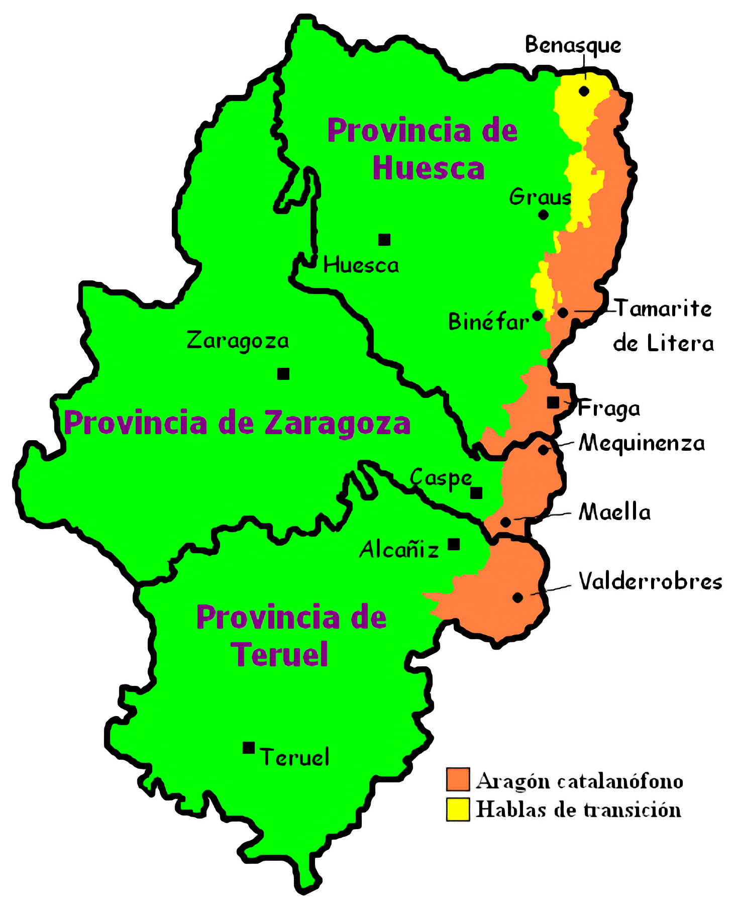 Franja catalanófona de Aragón